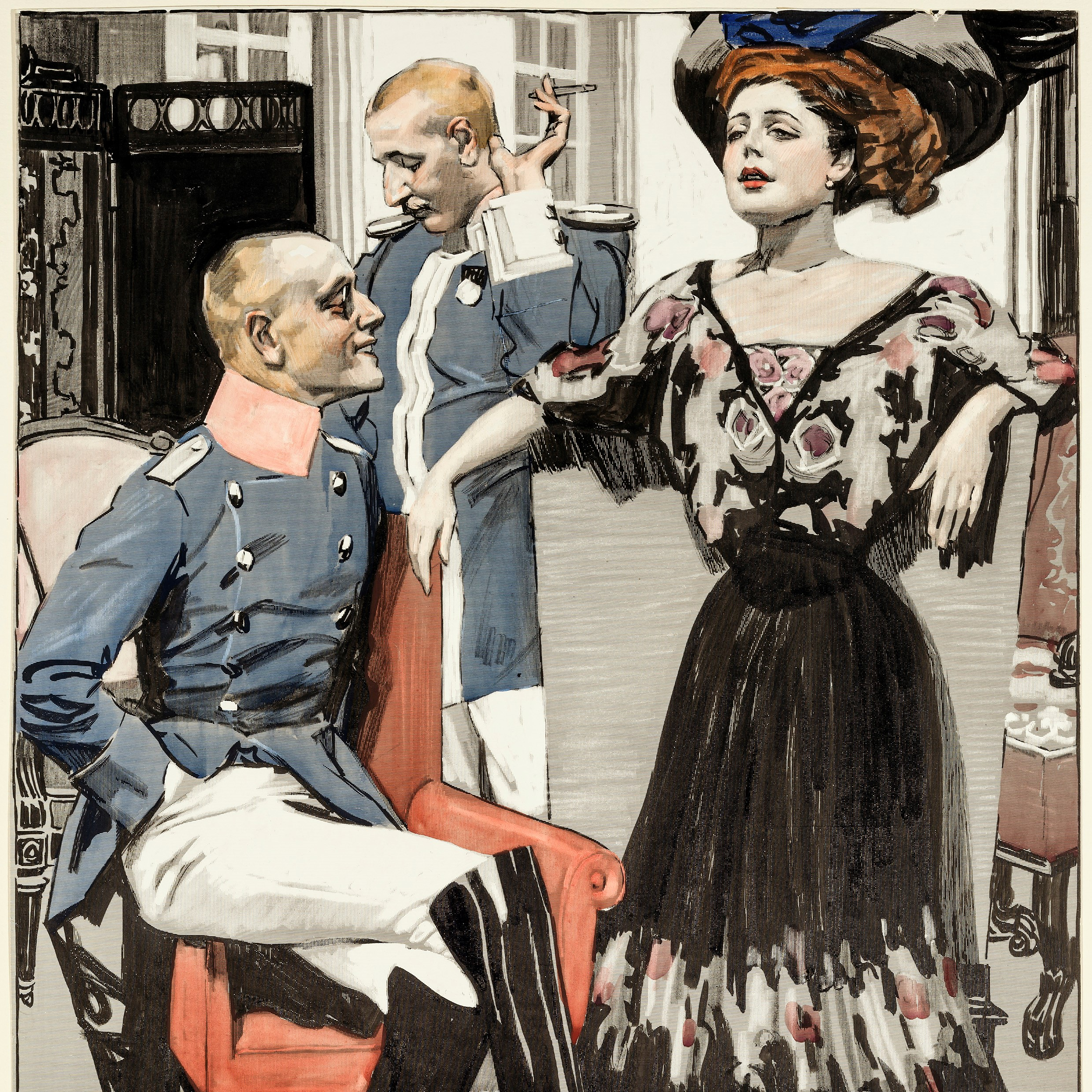 Ernst Heilemann: Milliardäre. Aquarell, Tusche und Deckweiß auf Karton, 42 x 30 cm, rechts unten signiert